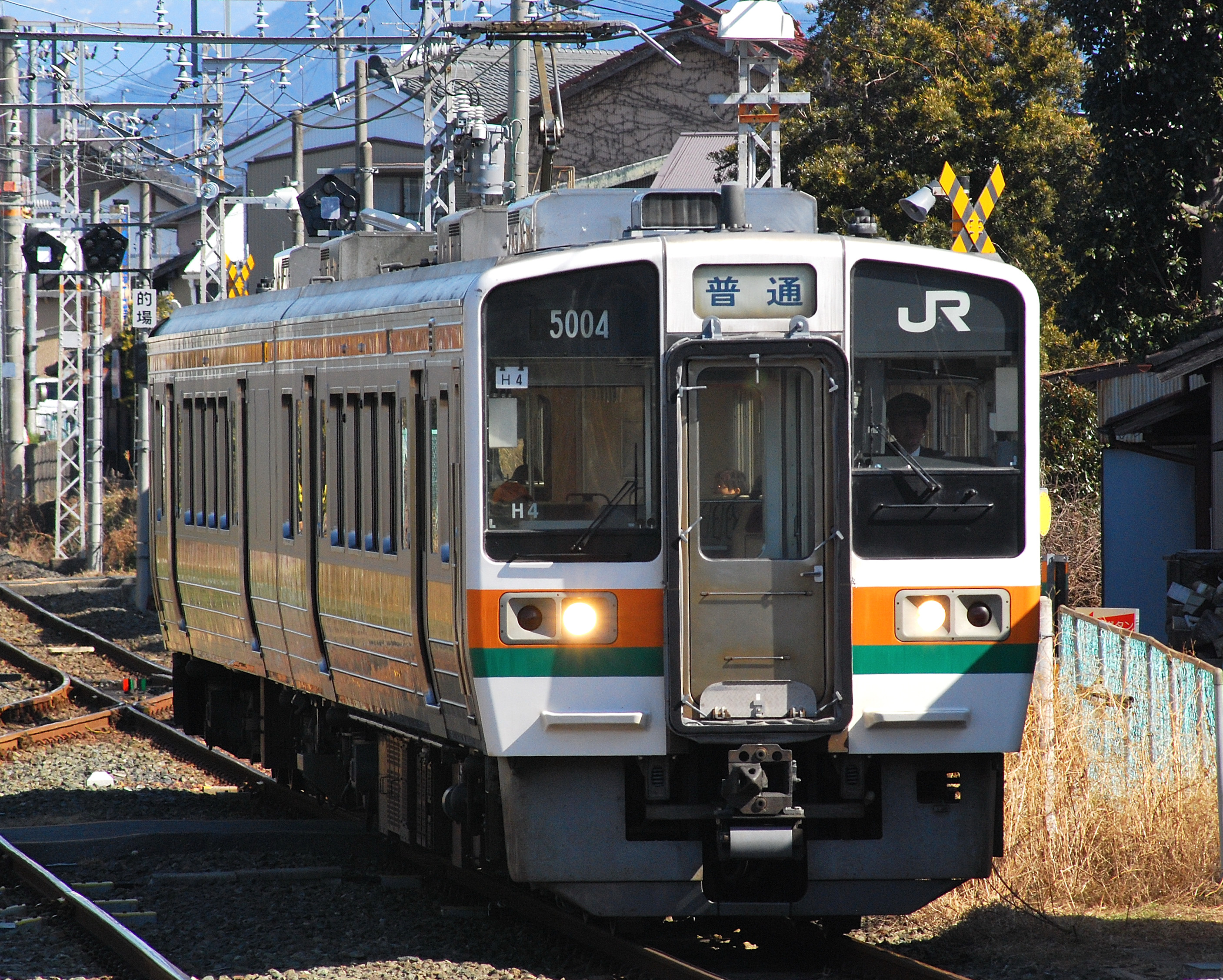 飯田線で営業運転を開始した213系5000番台H4編成。（ホームから撮影）